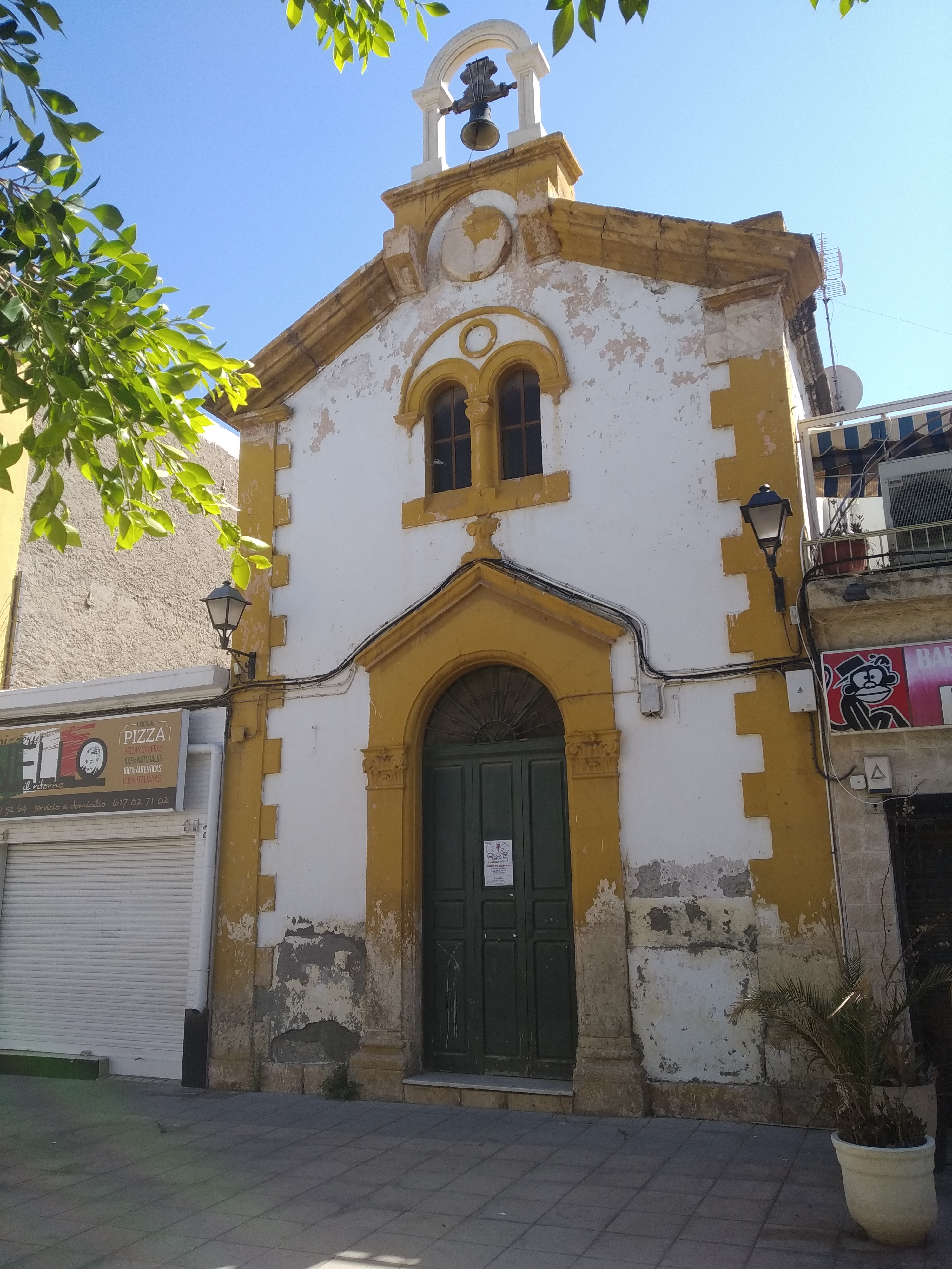 Capilla de San Antonio de Padua, construida en el siglo XIX. Actualmente se encuentra abandonada. Está ubicada en el barrio almeriense de Los Molinos.